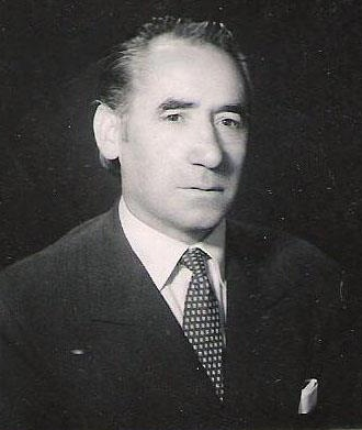 Don Feliciano Gambarte en 1940.